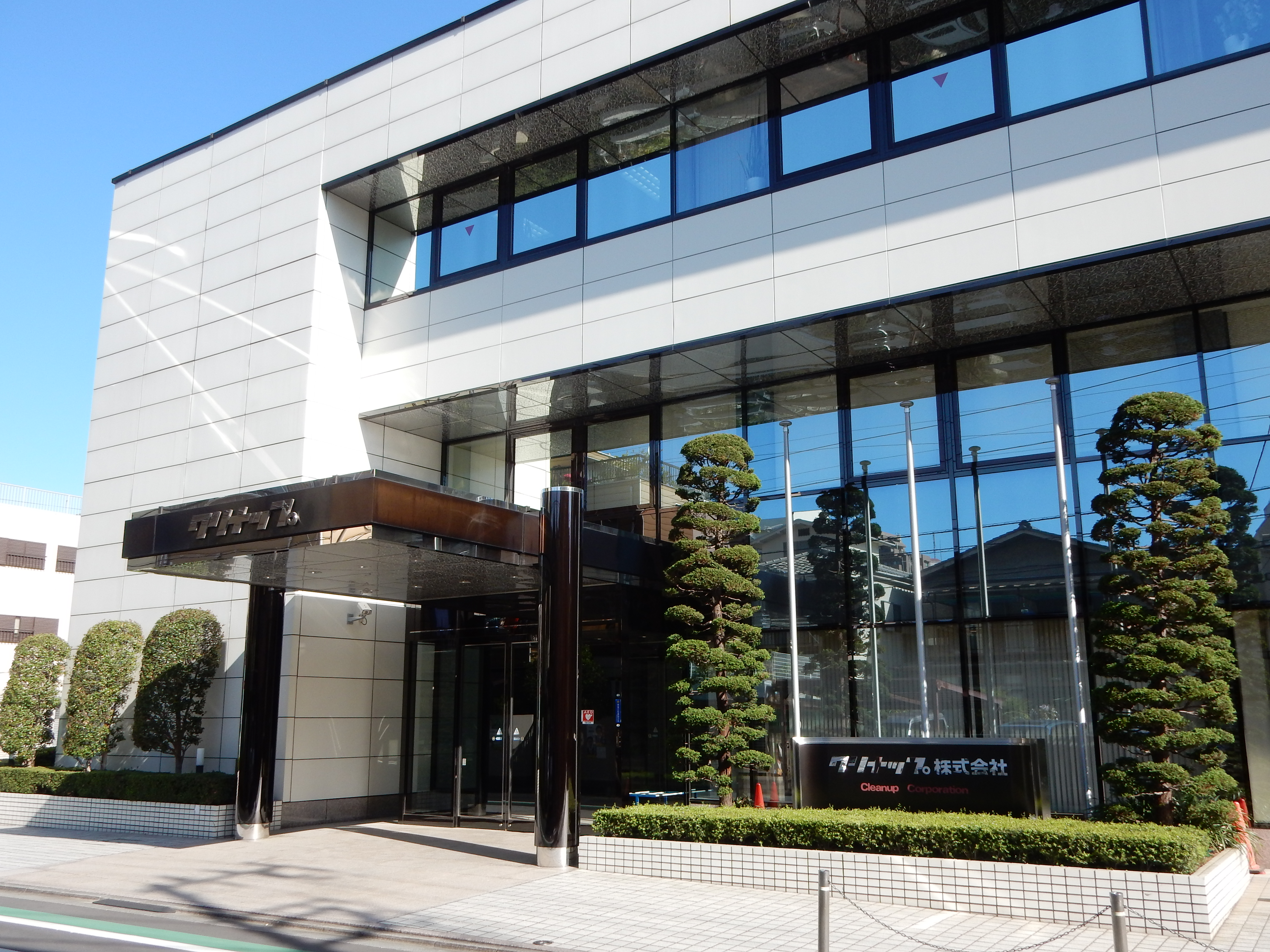 クリナップ本社。東京都荒川区西日暮里6丁目22番22号